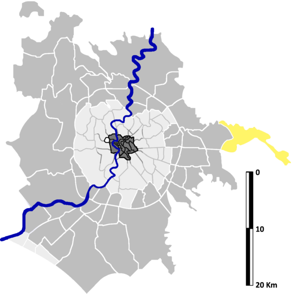 San Vittorino